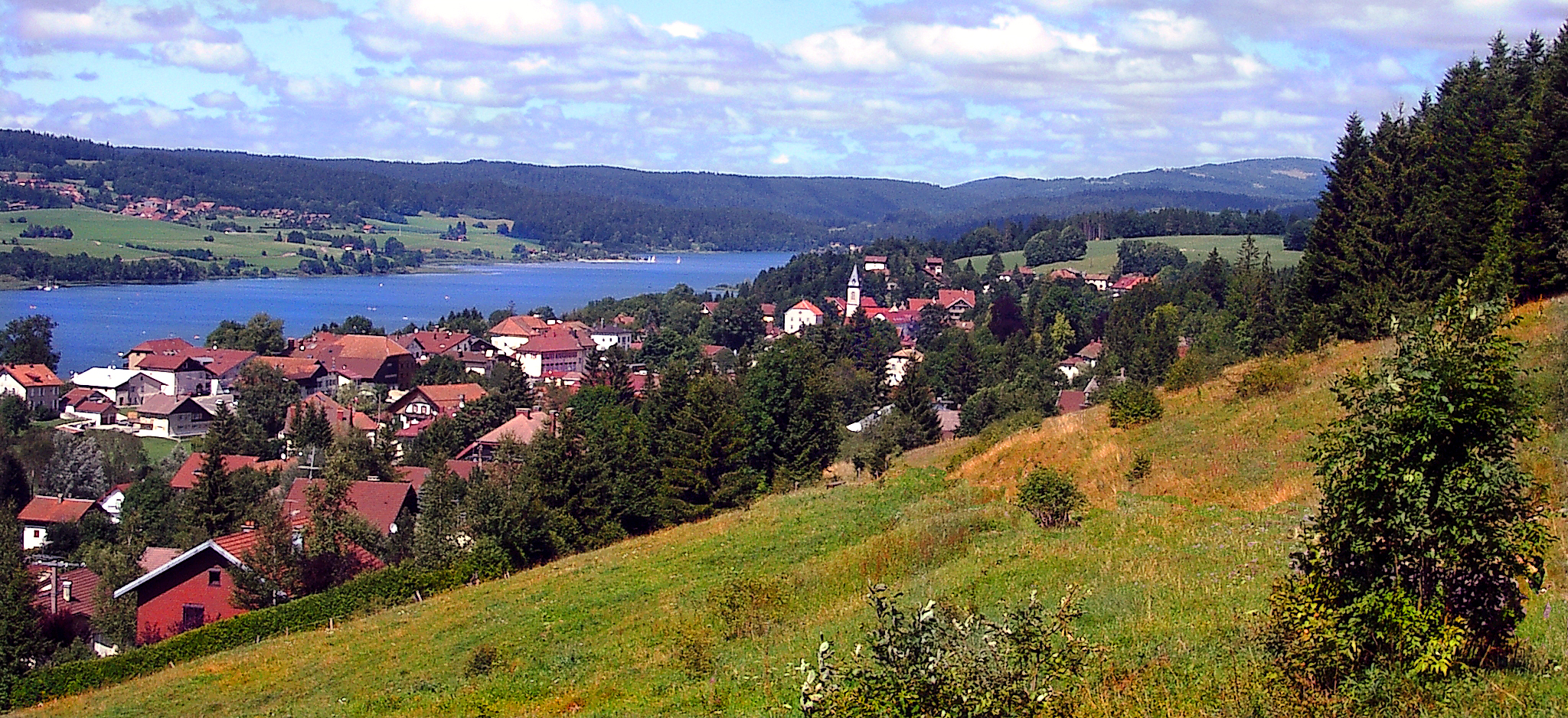 Vue plongeante sur Malbuisson